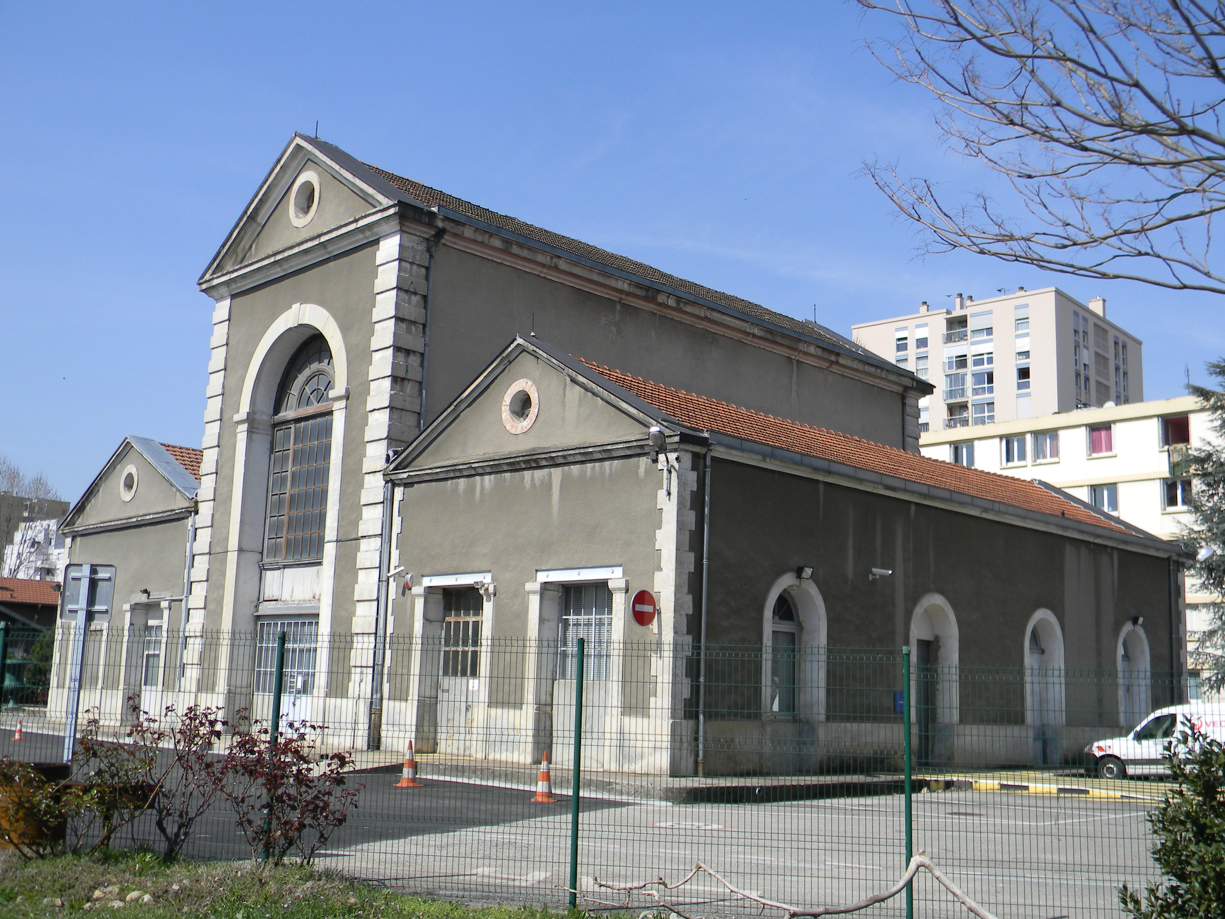 Usine des eaux Veolia de Saint Clair à Caluire-et-Cuire